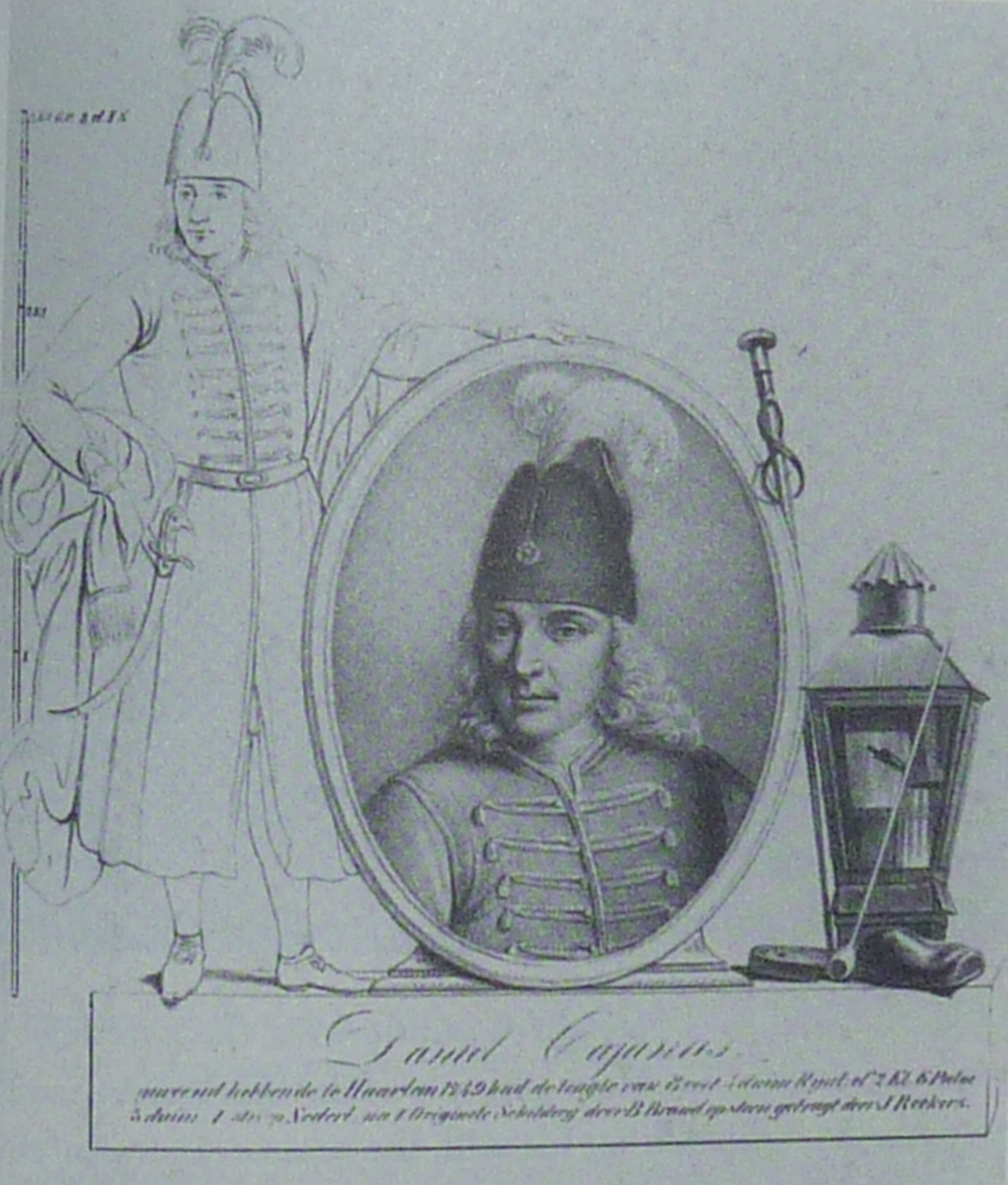 Erinnerung an Daniel Cajanus, holländischer Druck aus seinem Todesjahr